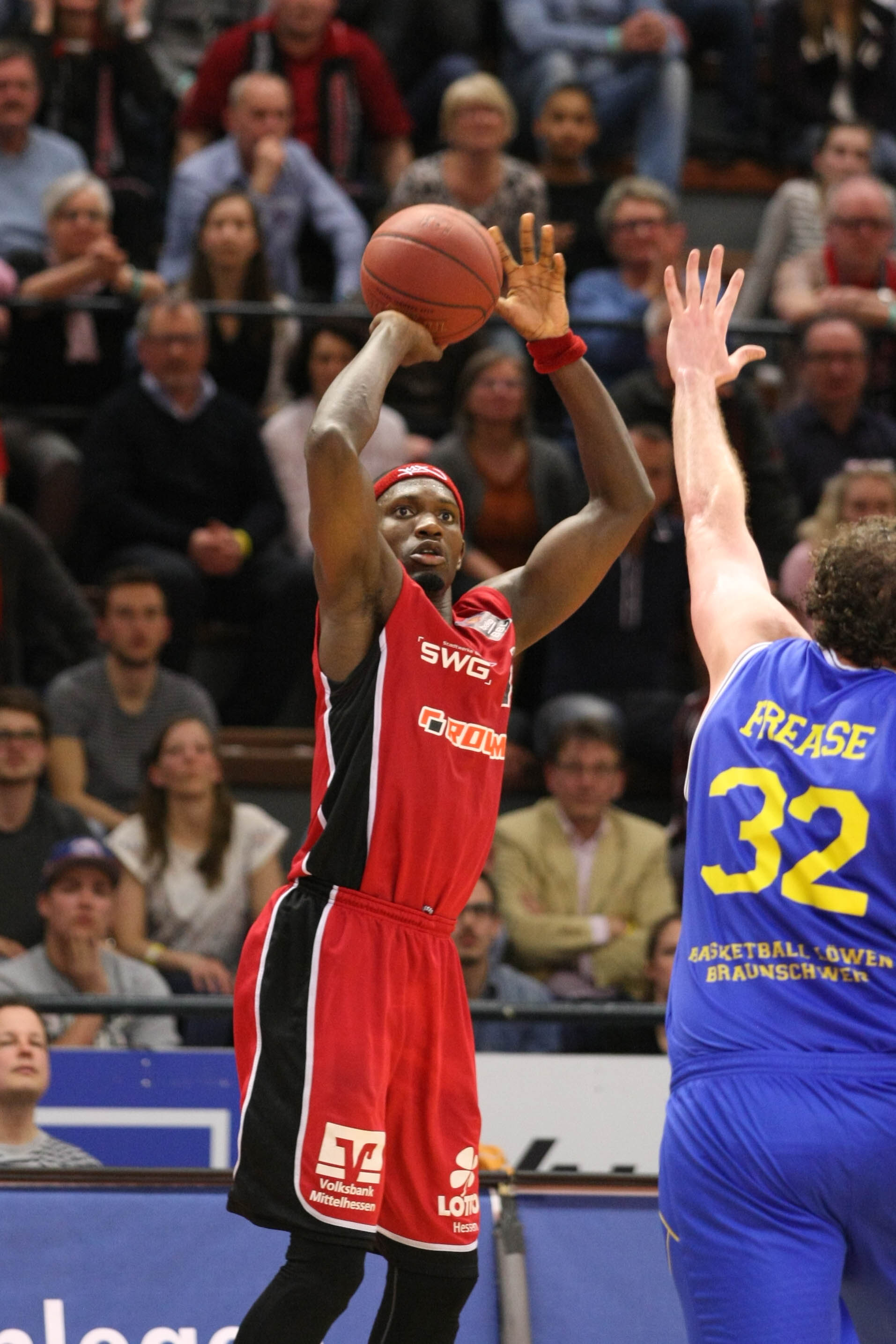 Giessen 46ers / Basketball Löwen Braunschweig (73-71)